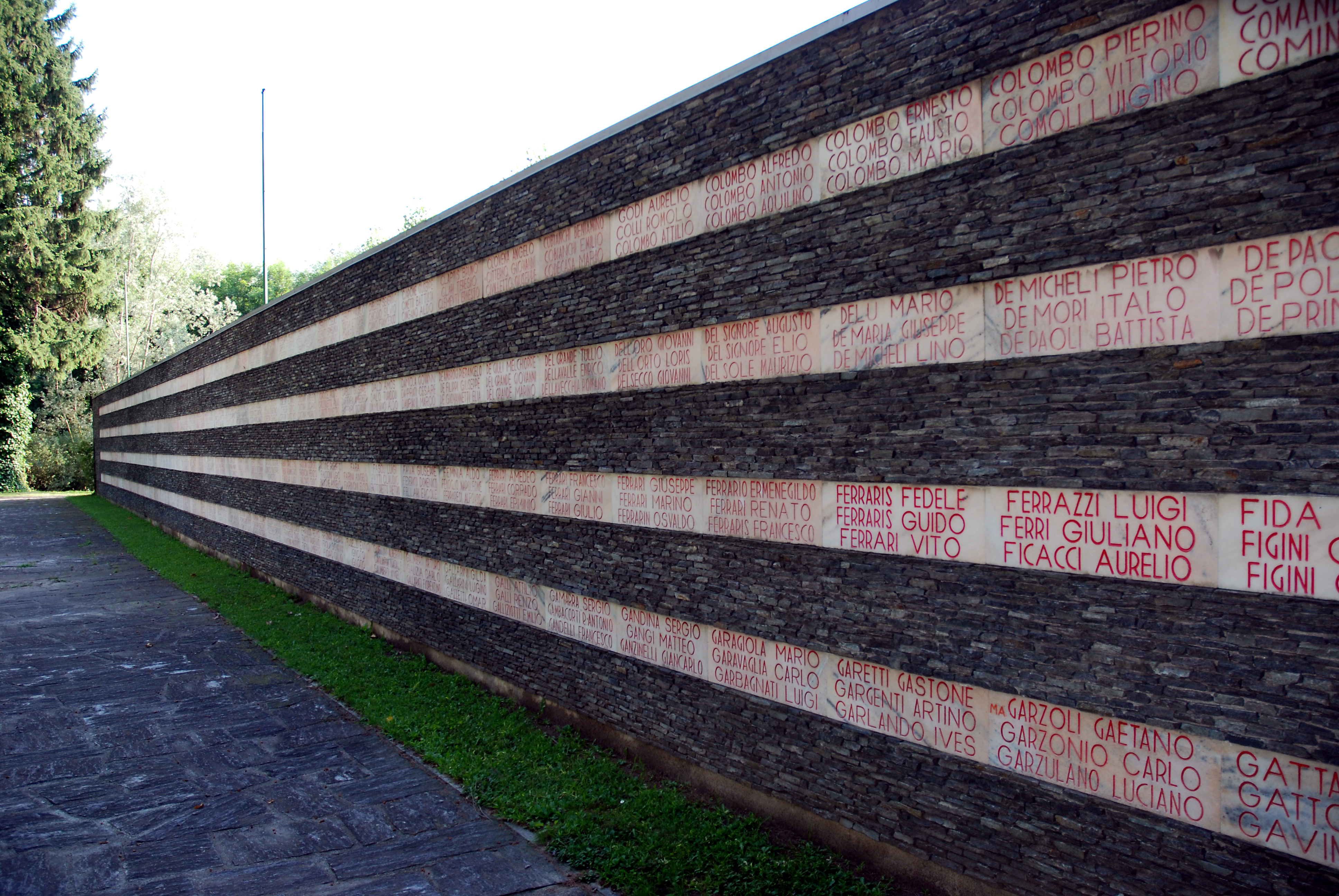 Casa della Resistenza in Fondotoce am Lago Maggiore bei Verbania, Gedenkstätte für die im zweiten Weltkrieg gefallenen Partisanen